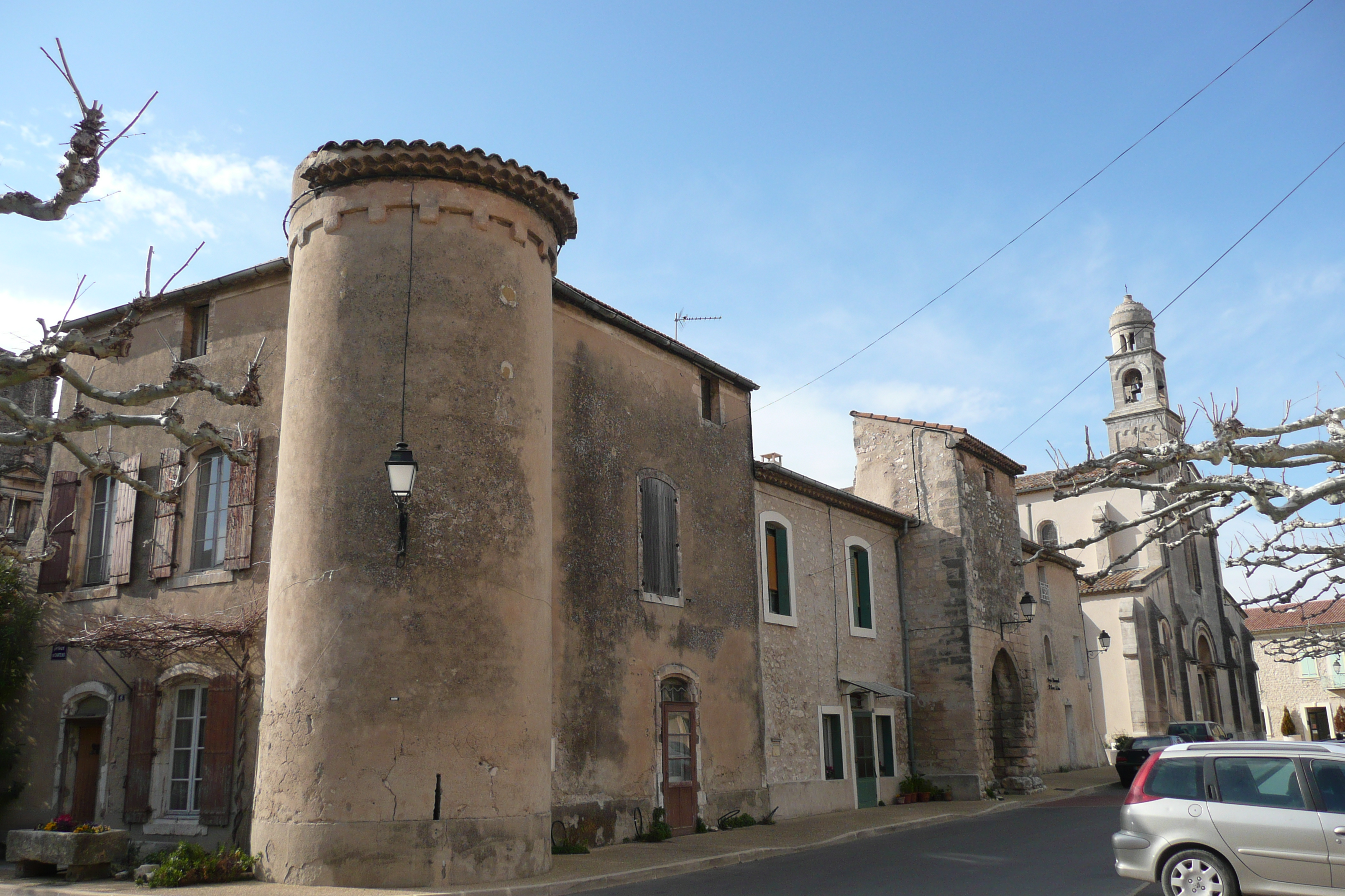 Château et Eglise à Mollégès.